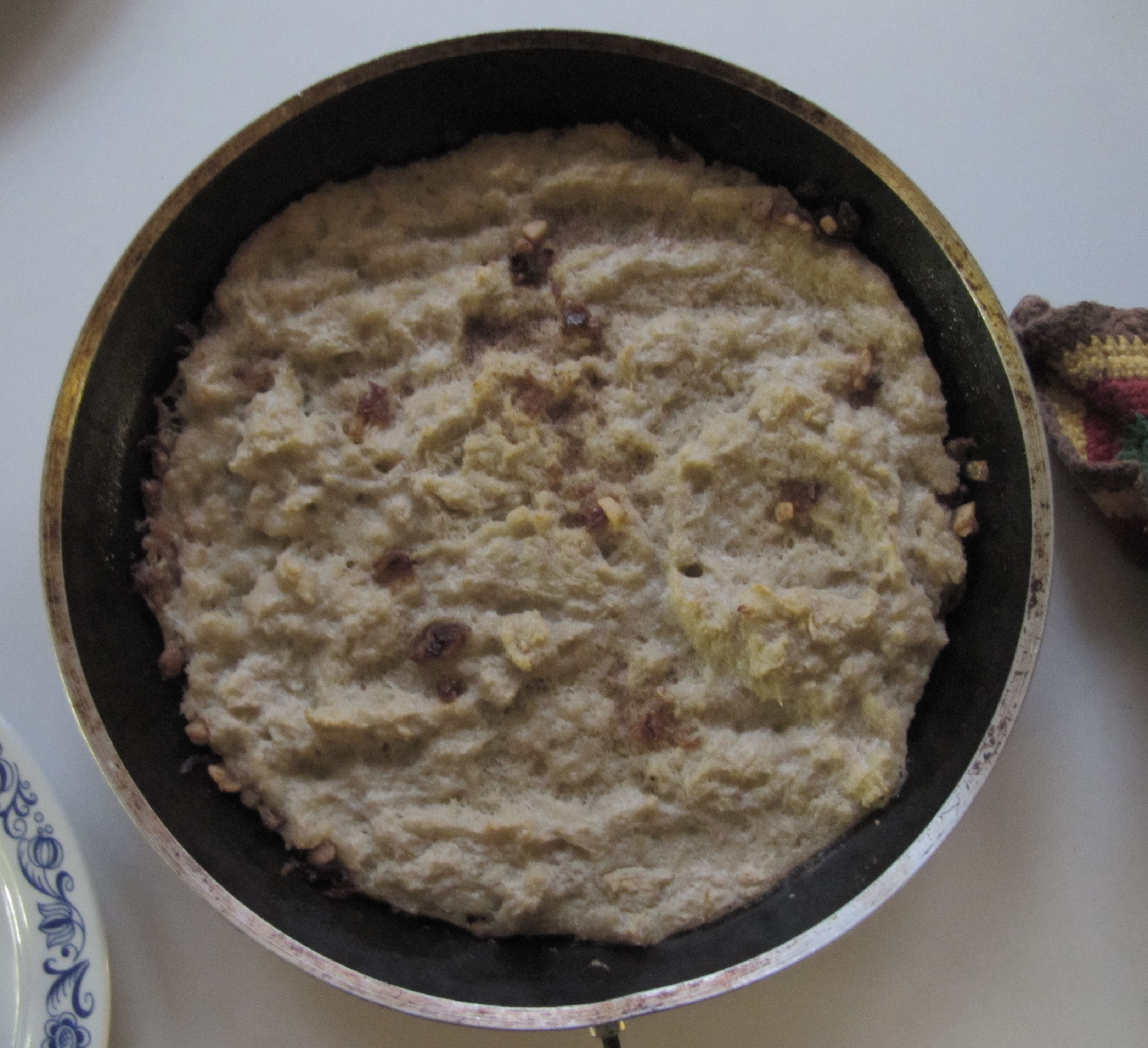 Buttermilchgetzen